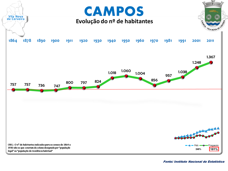 Censos 1864/2011